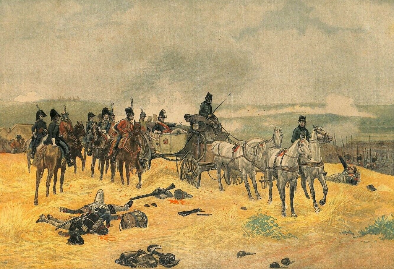 Le maréchal Masséna à la bataille de Wagram, le 6 juillet 1809. Blessé à la jambe par une chute de cheval quelques jours plus tôt, Masséna donne ses ordres depuis une calèche.